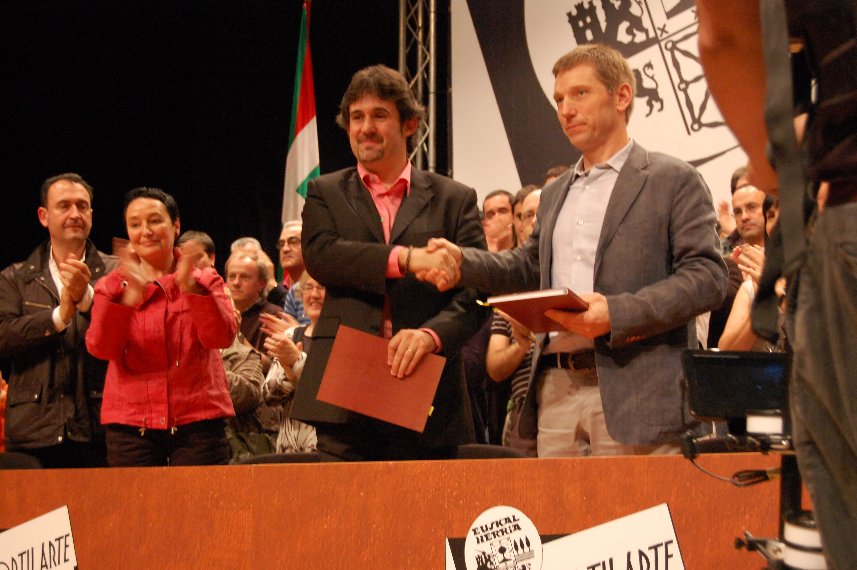 Pello Urizar eta Rufi Etxeberria, Lortu Arte akordioa sinatzen, Bilbon, Euskalduna Jauregian, 2010eko ekainaren 20an. Euren atzean Jone Goirizelaia ikus diateke.